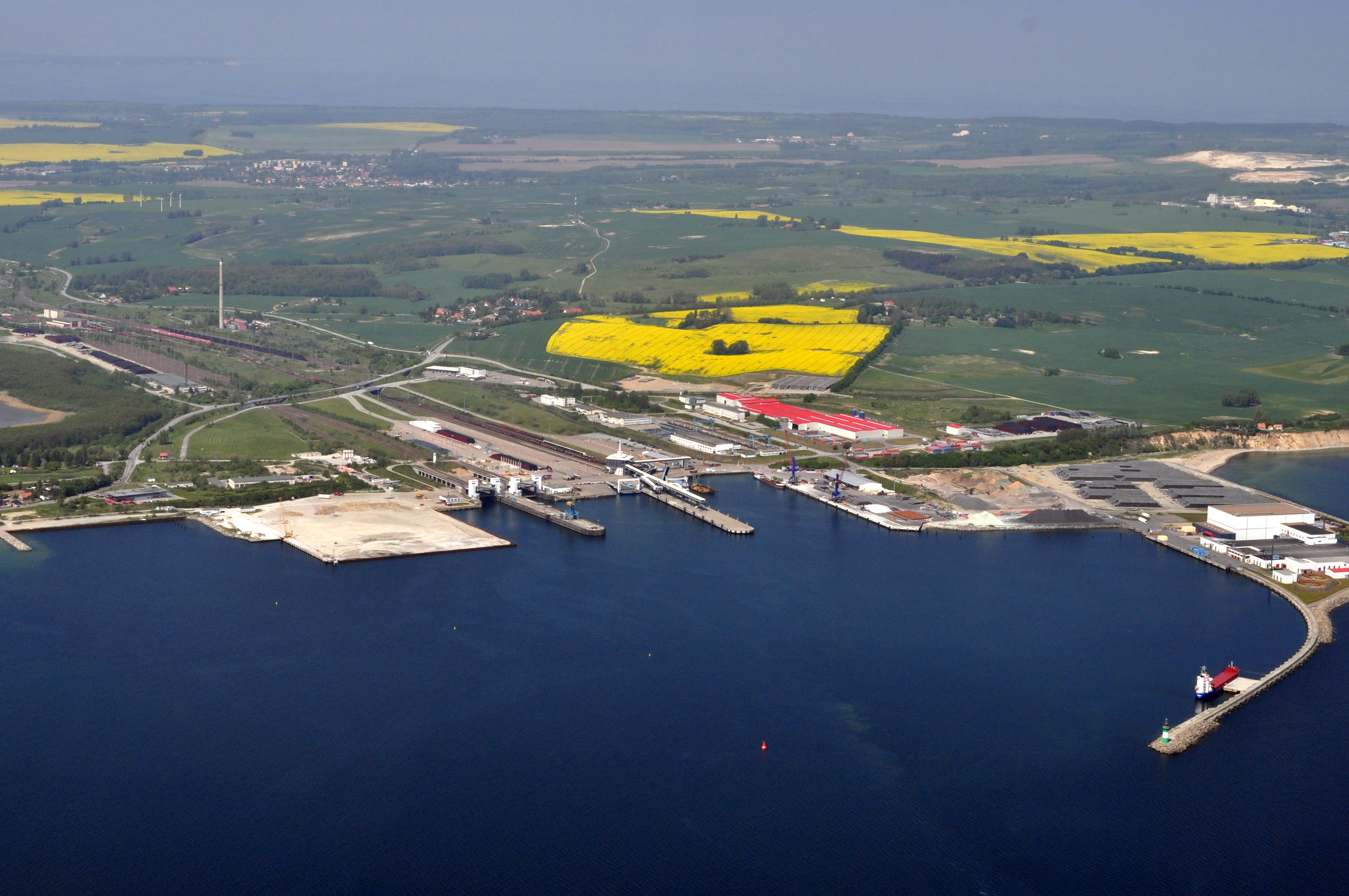 Die Bilder wurden von mir während eines einstündigen Rundflugs ab Flugplatz Güttin am 21. Mai 2011 aufgenommen. Die Bildbeschreibung steht im Dateinamen. Aufgenommen mit einer Nikon D5000 durch das Seitenfenster des Flugzeugs.